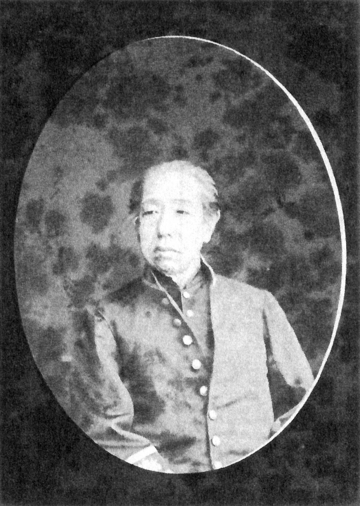 内藤政義の肖像写真。